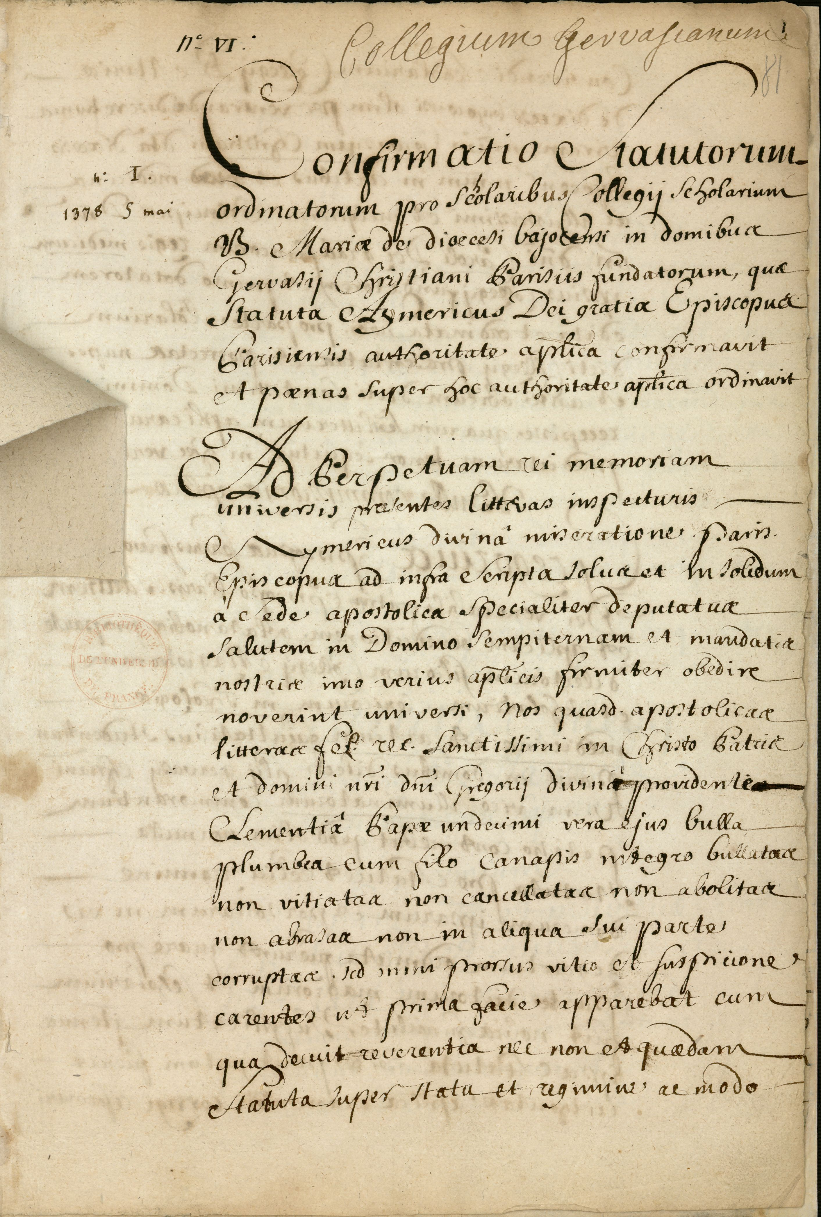 Manuscrit en latin, dans un registre de 738 feuillets consacré aux fondations et statuts des collèges.